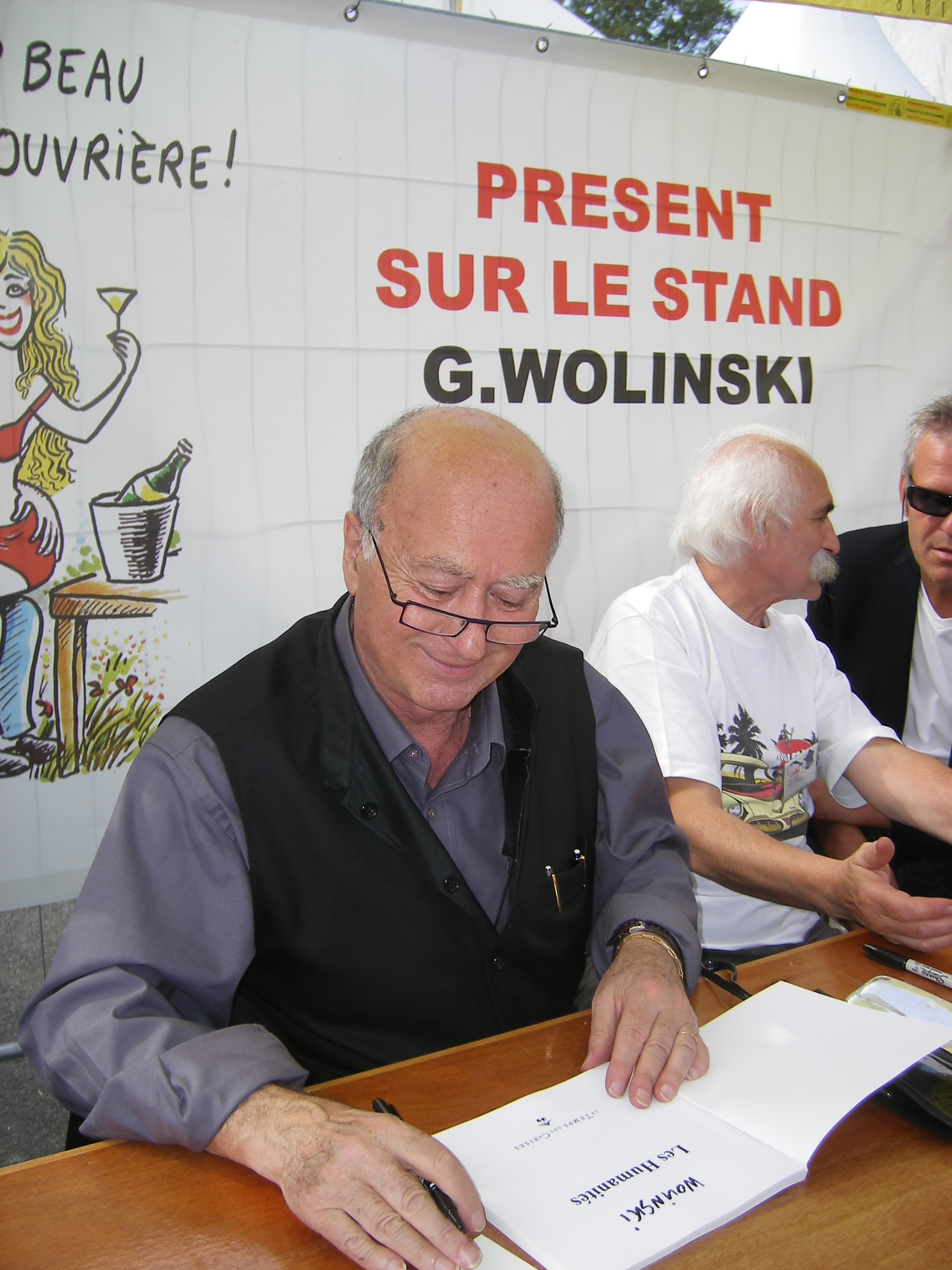 Georges Wolinski dédicaçant à la fête de l'Huma 2007.